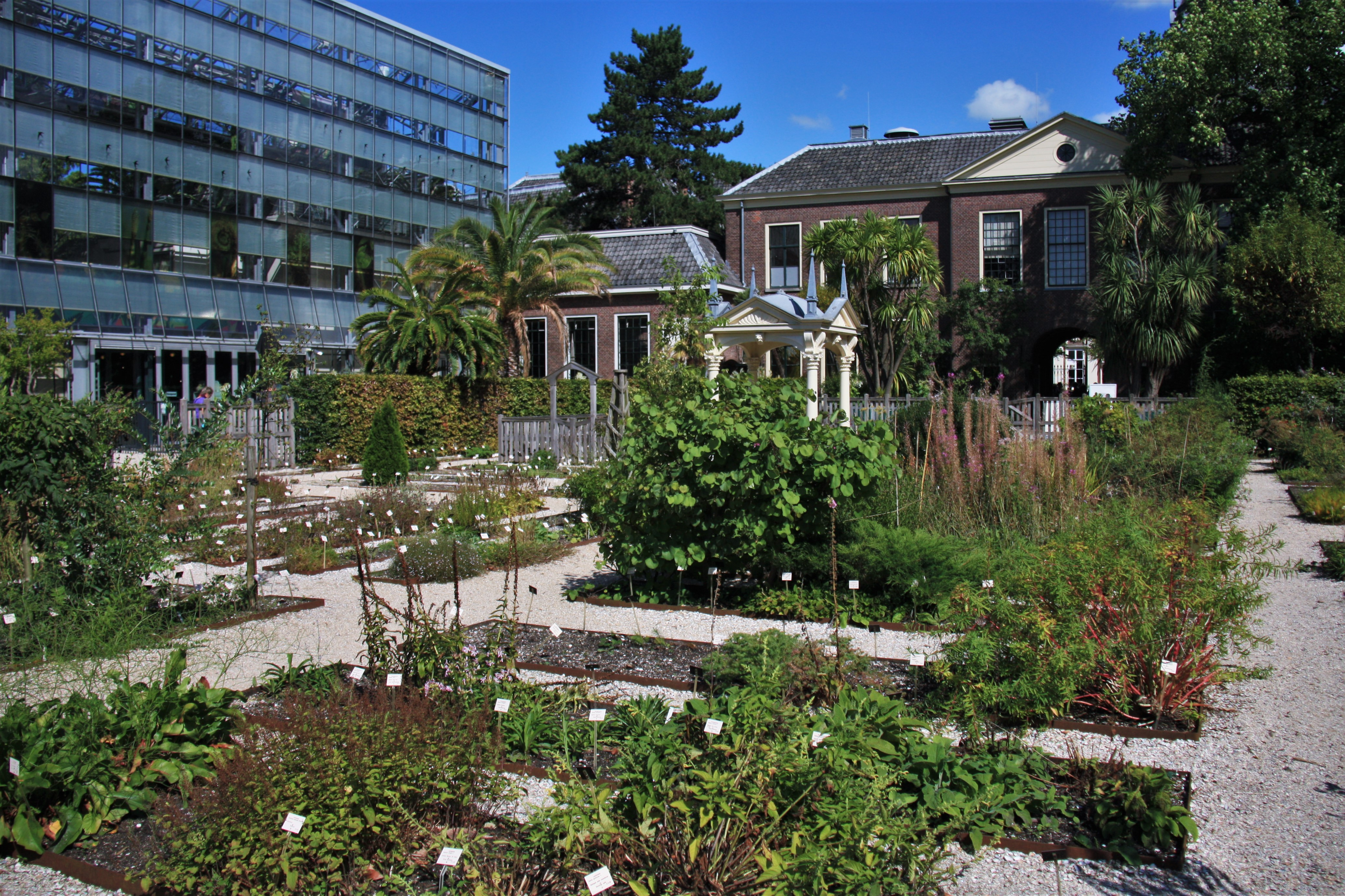 Сад Клузіуса у Лейденському ботанічному саду